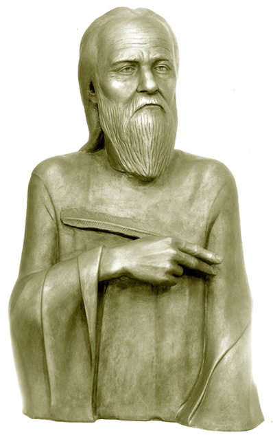 прп. Нестор-летописец (XI век). Скульптурная реконструкция по черепу С.А. Никитина, 1985. Nestor the Chronicler, Forensic facial reconstruction by S.A.Nikitin.